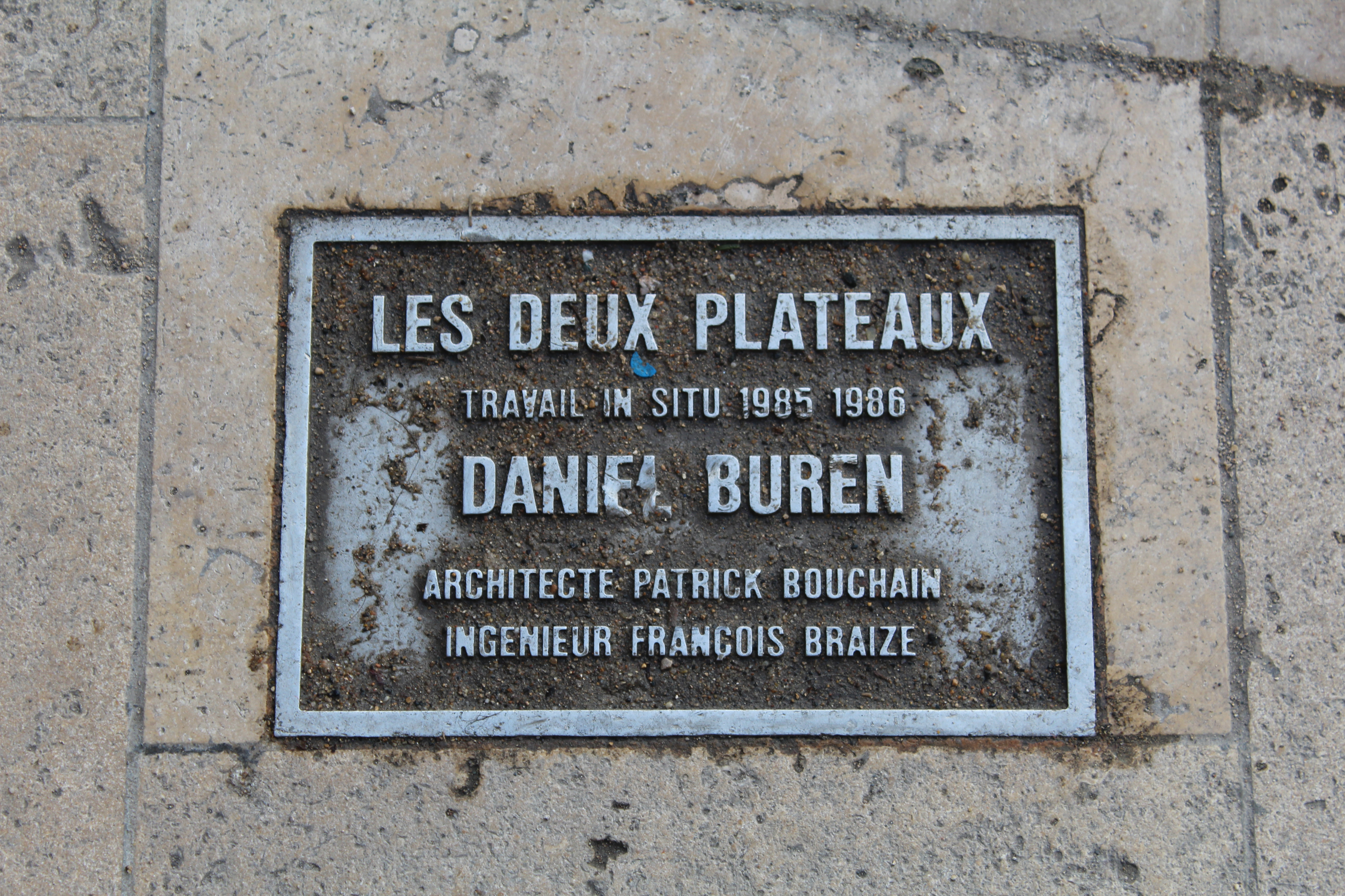 Inscription mentionnant la présence des Colonnes de Buren, Cour Honneur, Palais Royal, Paris.